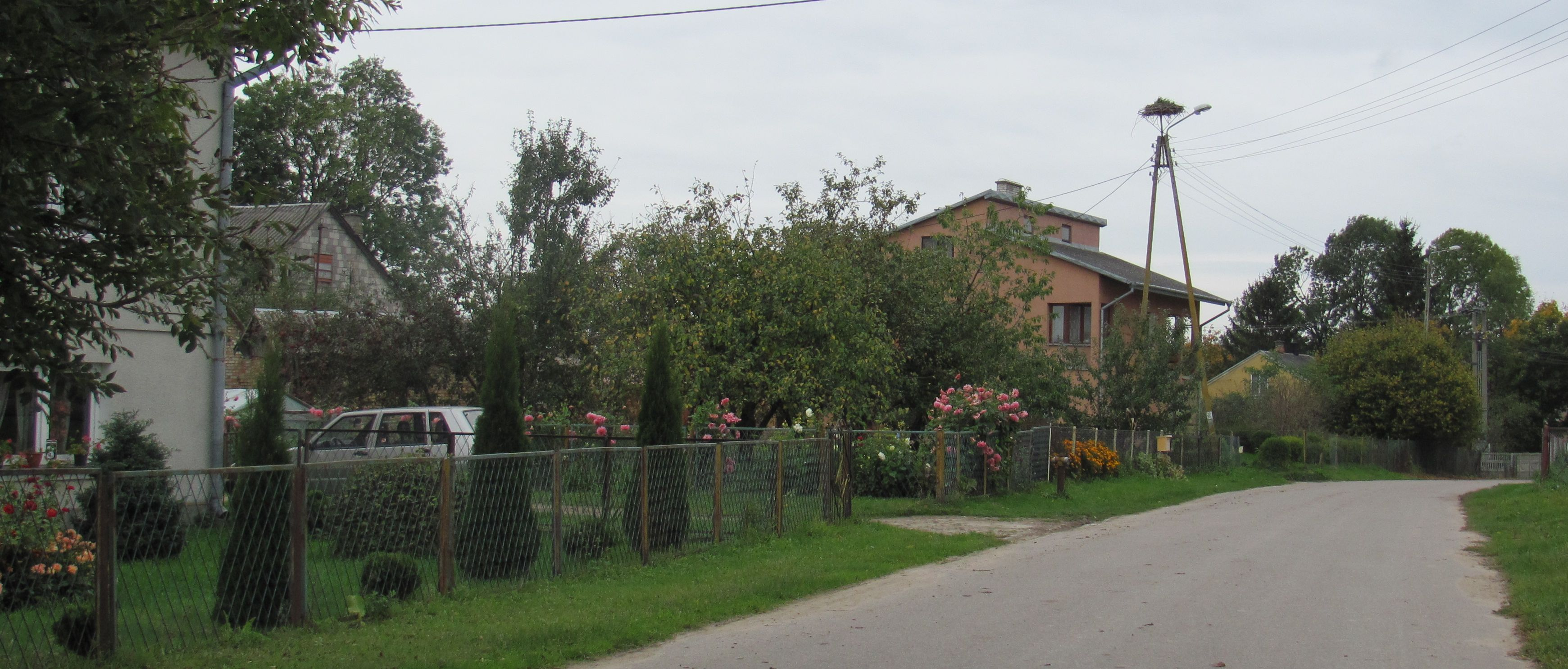 Widok od wschodu.